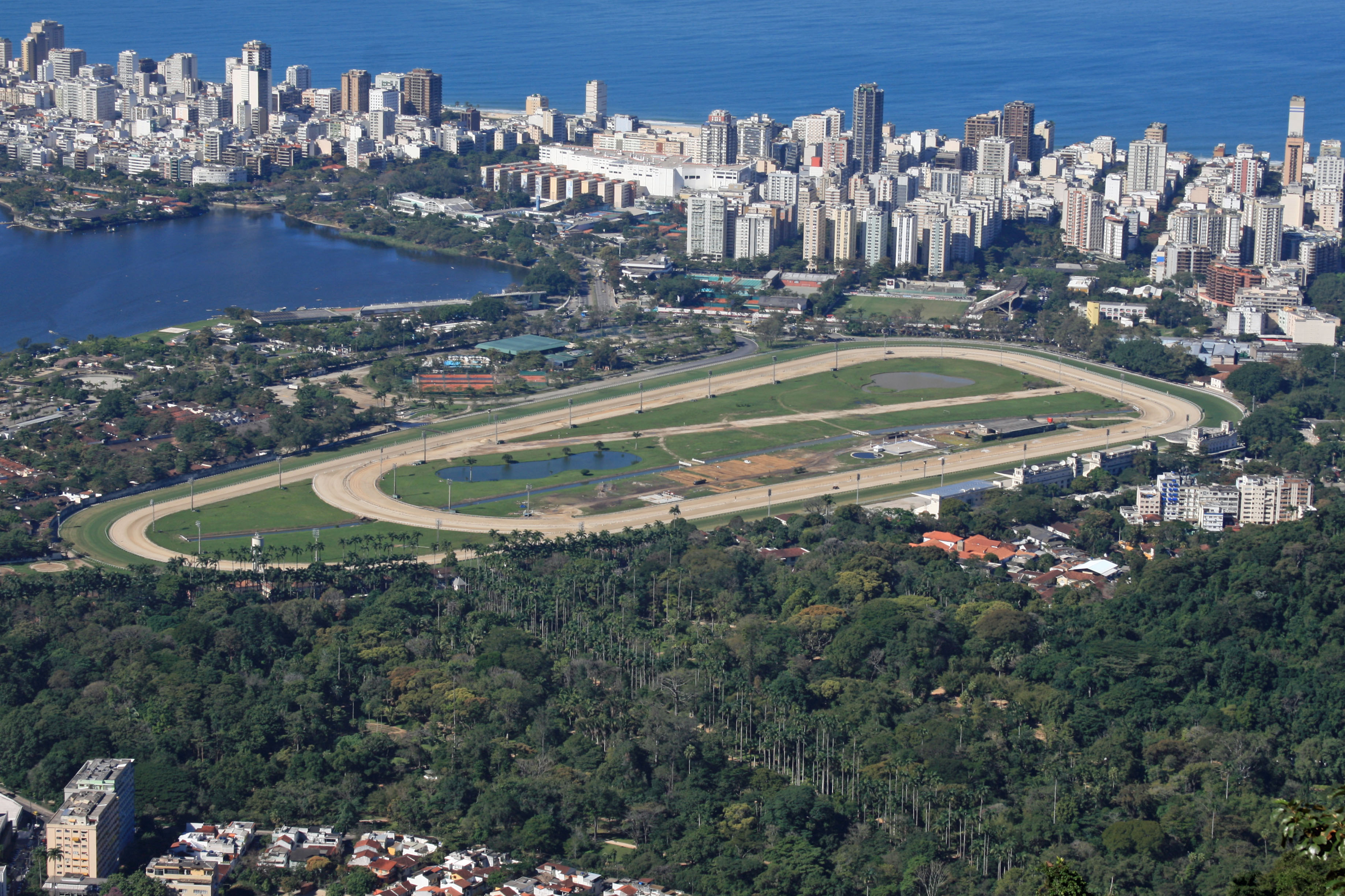 Hipódromo da Gávea visto da Estrada Redentor